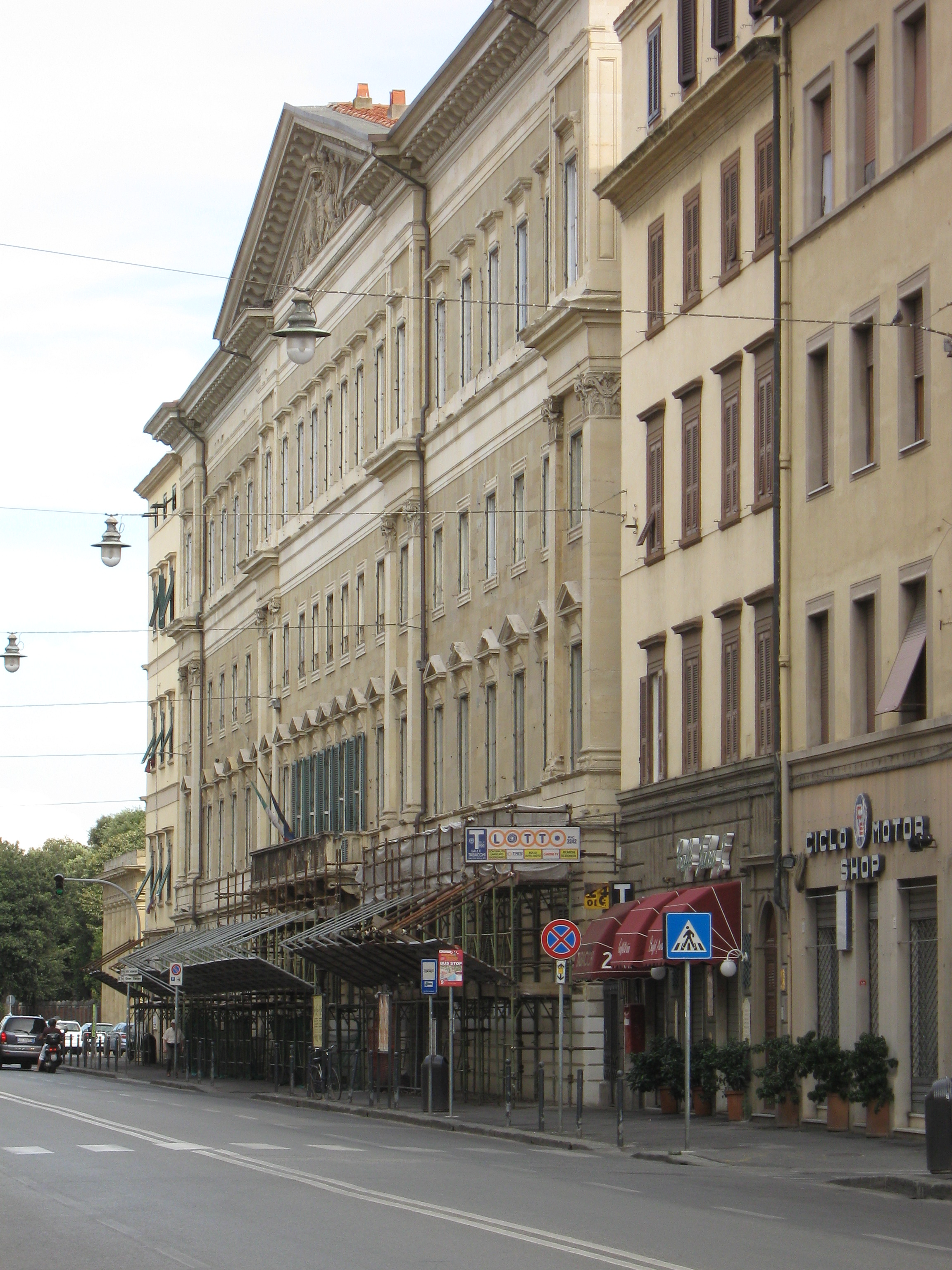 Livorno: il Palazzo de Larderel (XIX secolo). Scorcio della facciata in evidente stato di degrado.